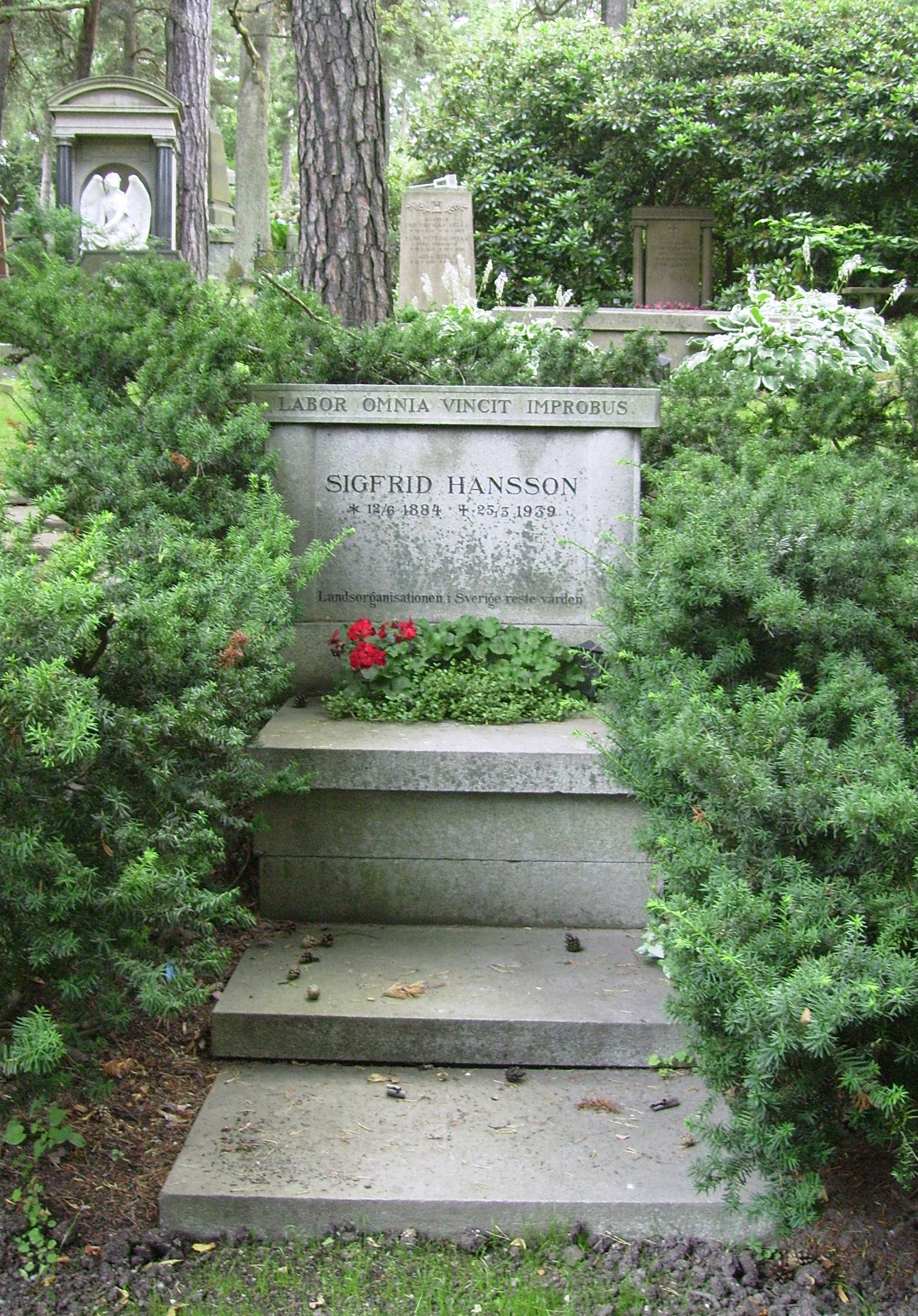 Picture of Sigfrid Hansson's grave at Norra begravningsplatsen in Solna.